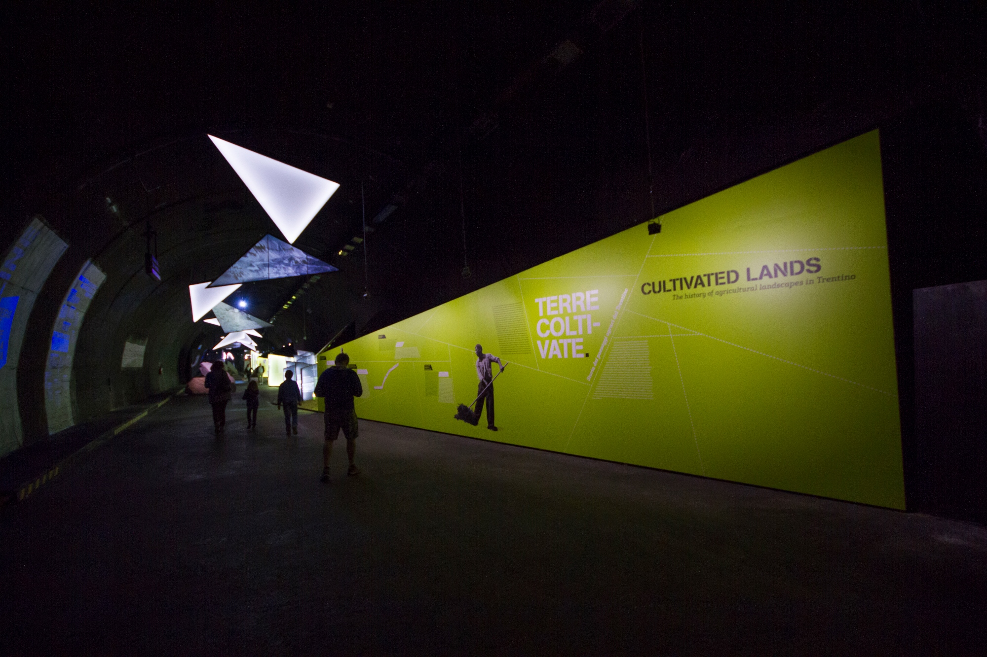 Gallerie di Piedicastello This is a photo of a monument which is part of cultural heritage of Italy.